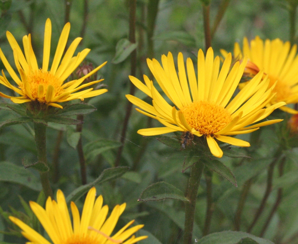 Inula_hirta (Enula scabra) Località : Giardino Botanico Alpino "Giangio Lorenzoni", Pian Cansiglio, Tambre d'Alpago (BL), 1000 m s.l.m.